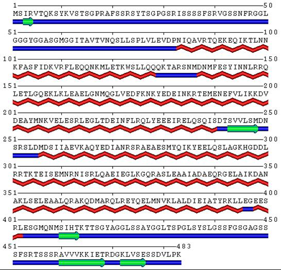 Structure secondaire de la kératine 8 on remarque le centre en rouge décrivant les hélices alpha.